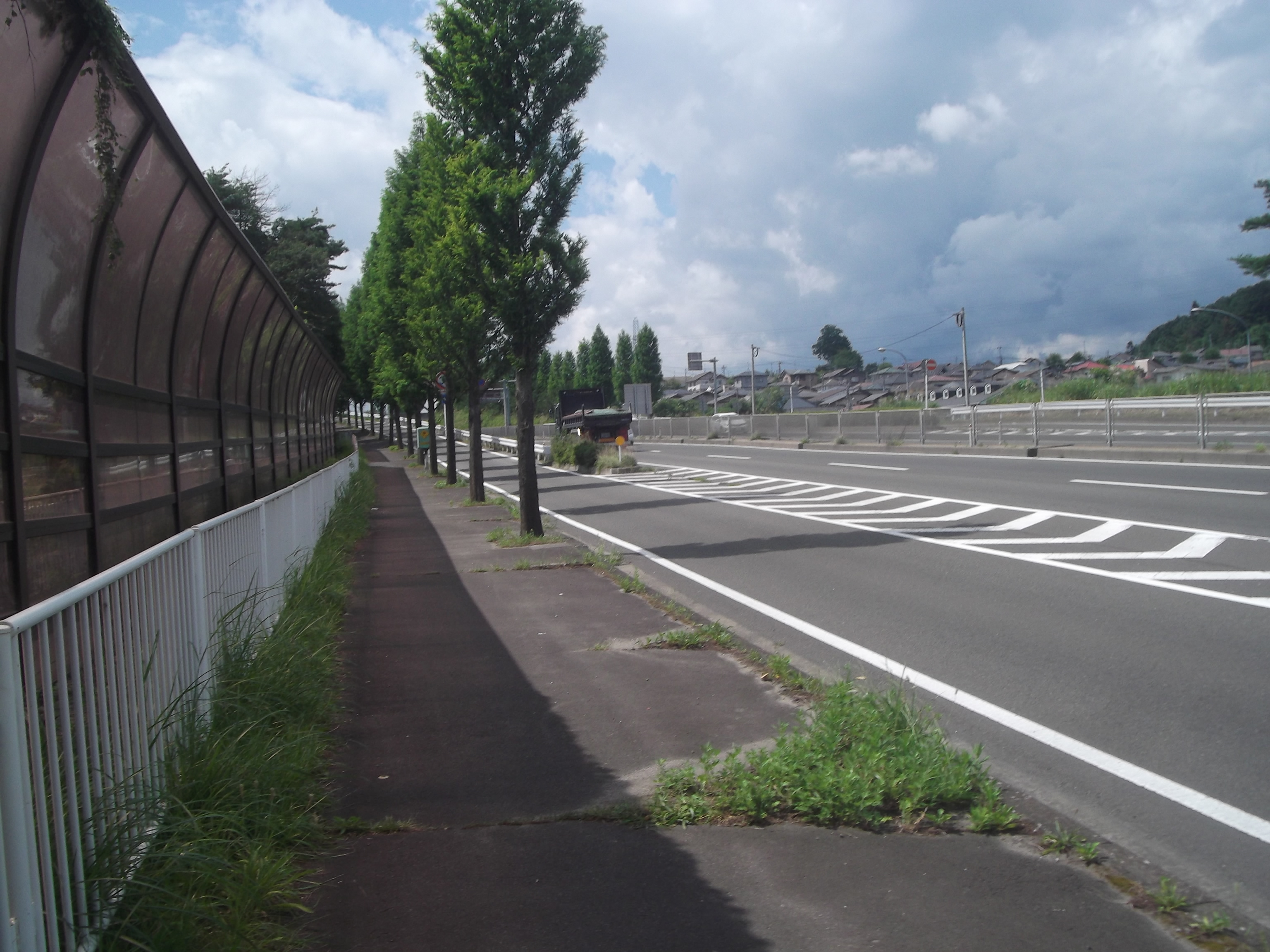 仙台市青葉区西花苑付近の愛子バイパス。